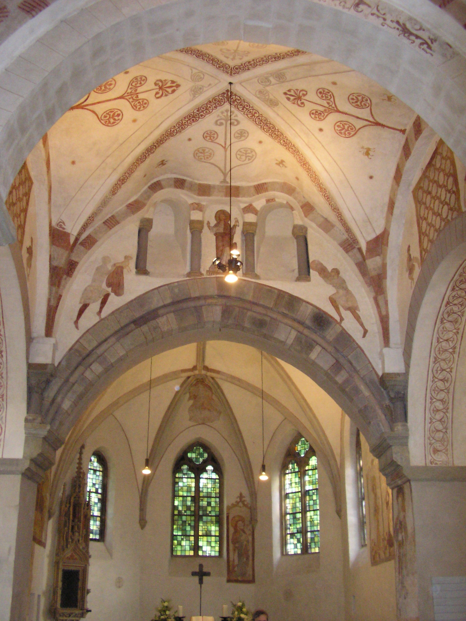 Stiepel Dorfkirche